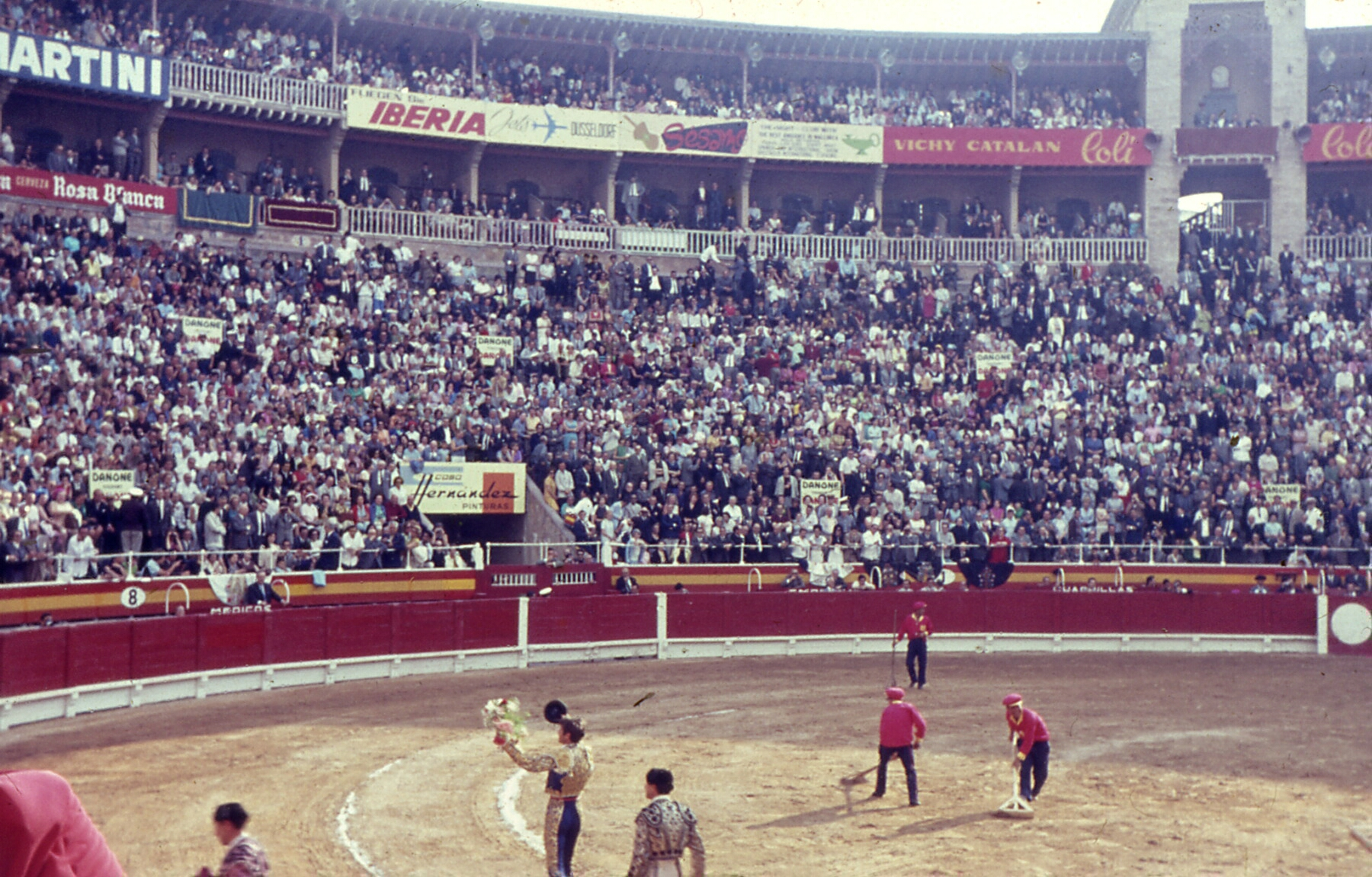 Steirkampf in Palma